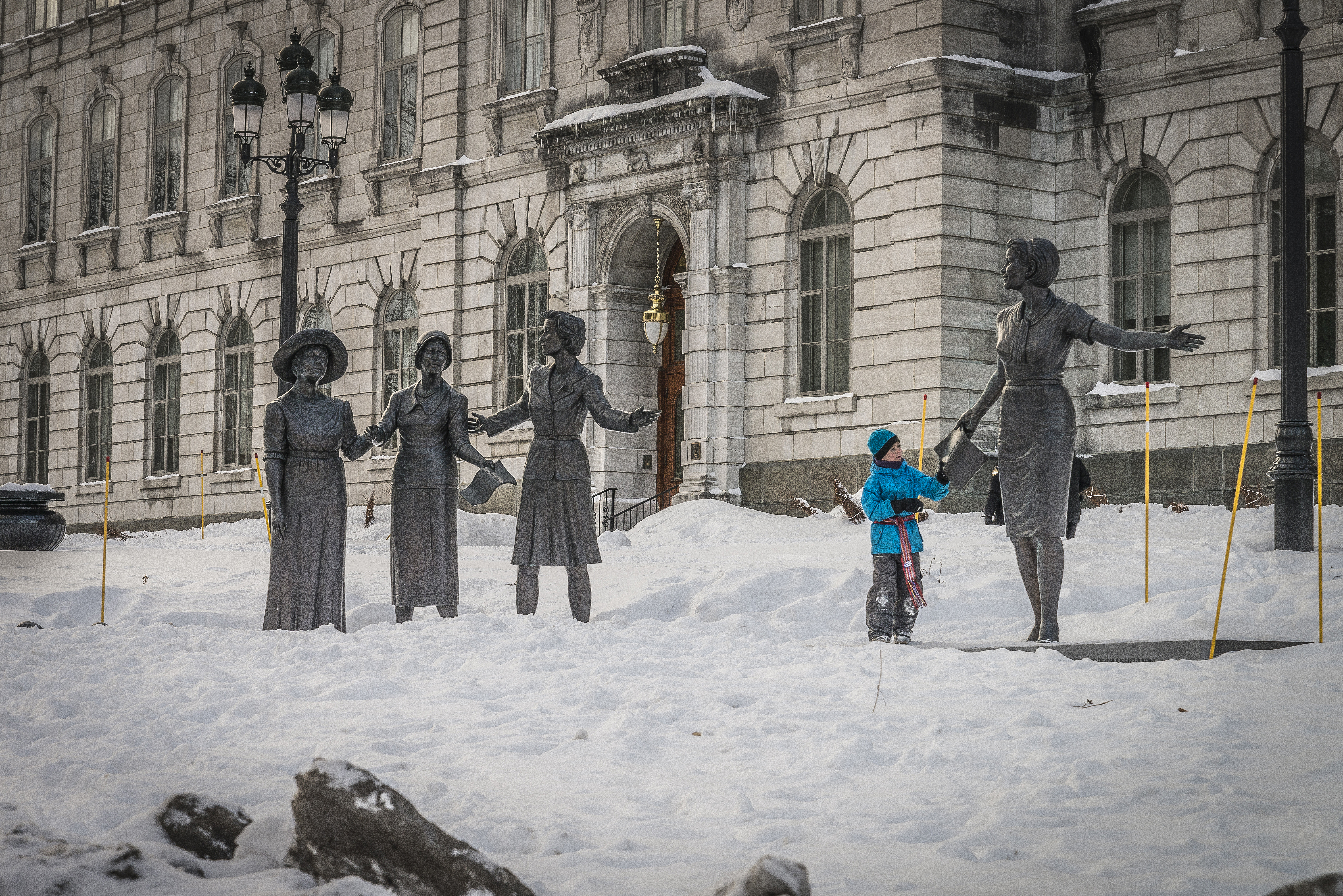 Monument en hommage aux femmes en politique, à Québec. Photo prise pendant la période du carnaval de Québec de 2014.